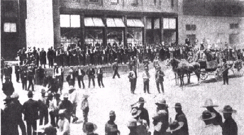 Tienda de raya de Cananea, Sonora, México, custodiada por soldados norteamericanos durante los sucesos de la Huelga de Cananea, 1906.